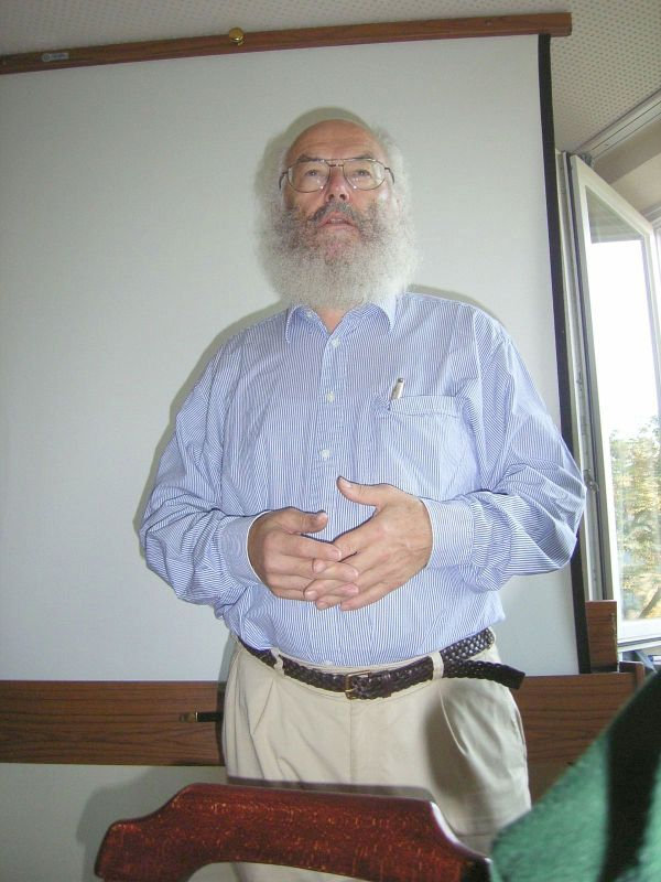 Kampanjo kontraŭ grapolbomboj, Agendo 21: Manfred WESTERMAYER. Dum BAVELO-renkontiĝo en 2009.